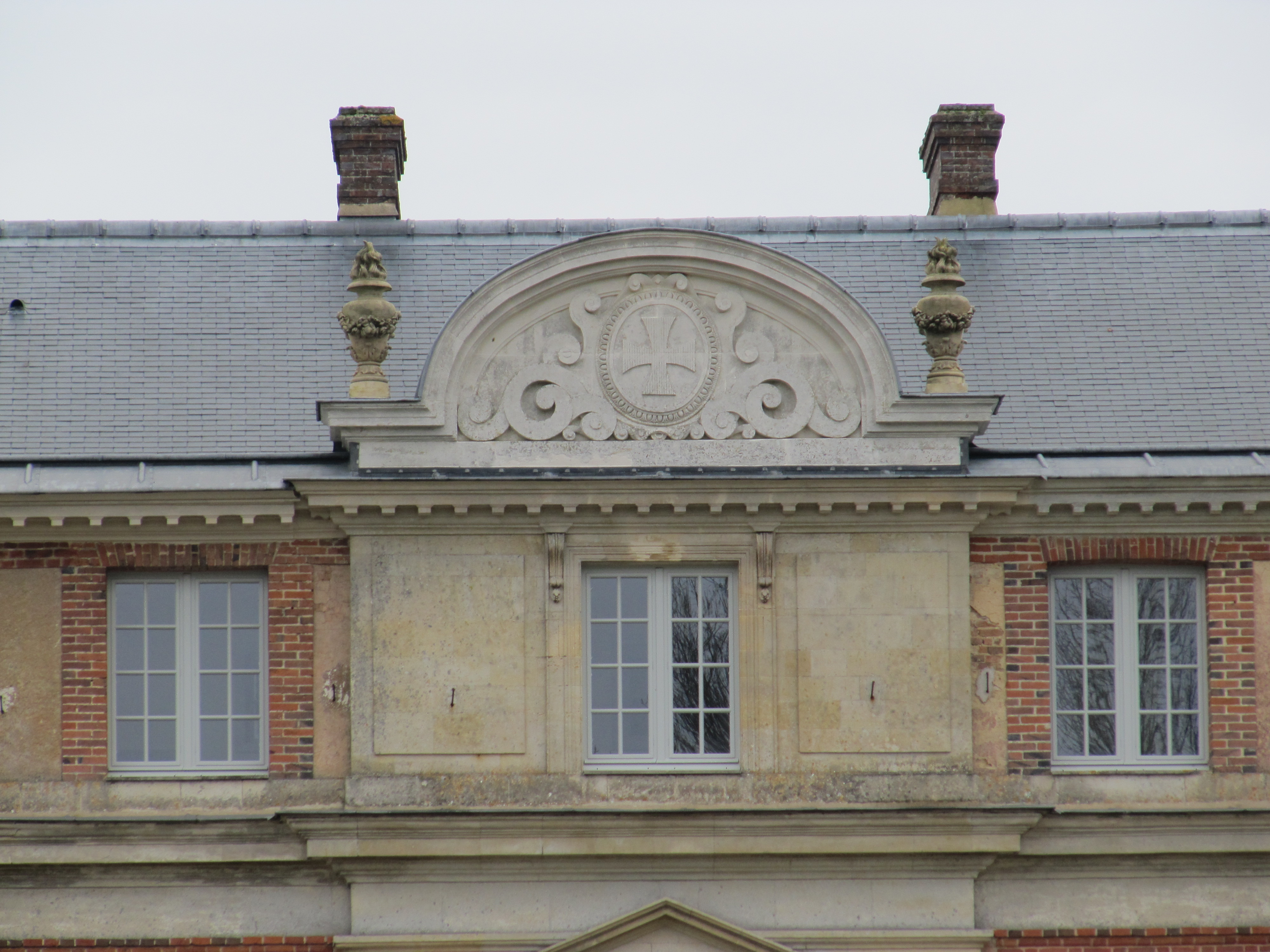 Le fronton date de la Restauration, on y voit le blason de la famille du Tillet, une croix pattée, inspirée de la croix de Malte.